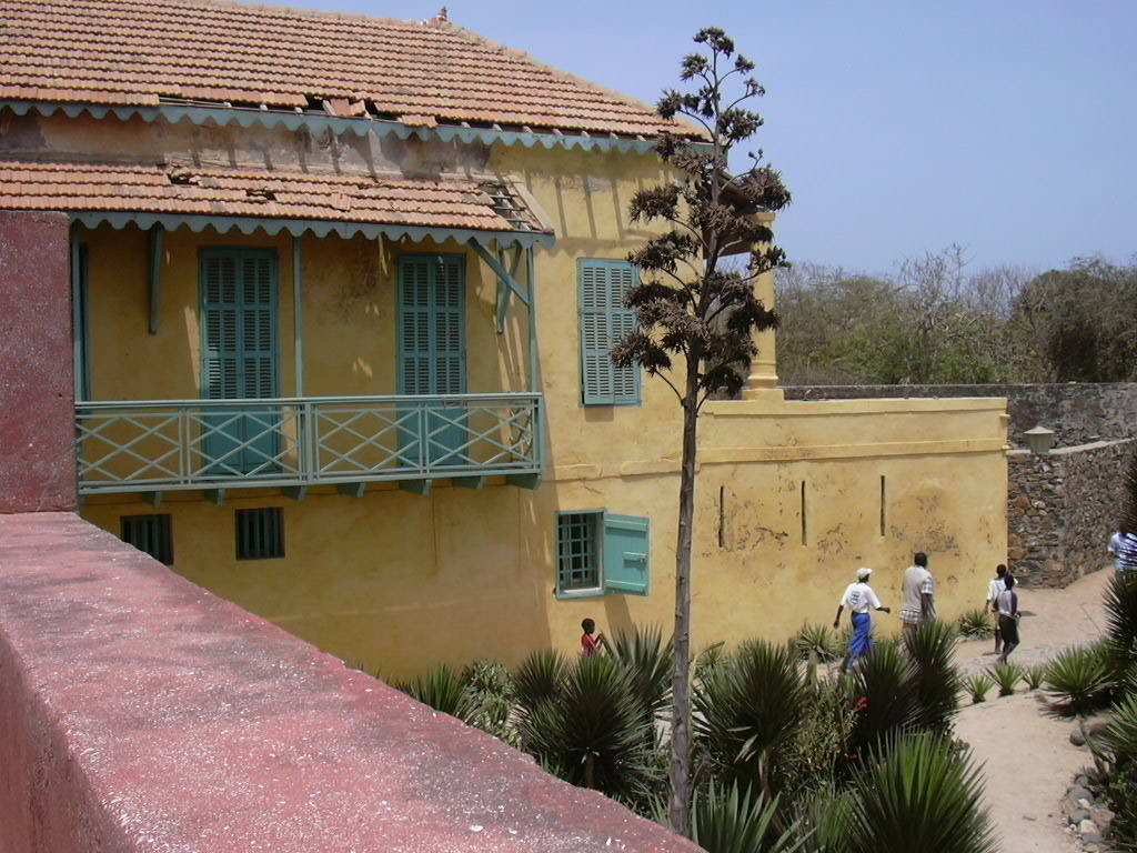 Cette maison Bâtie au début du XVIII par la signare Victoria Albis Comme dernier eut propriétaires privés, les frères Alexandre et Armand Angrand qui la vendirent à l'État en 1964